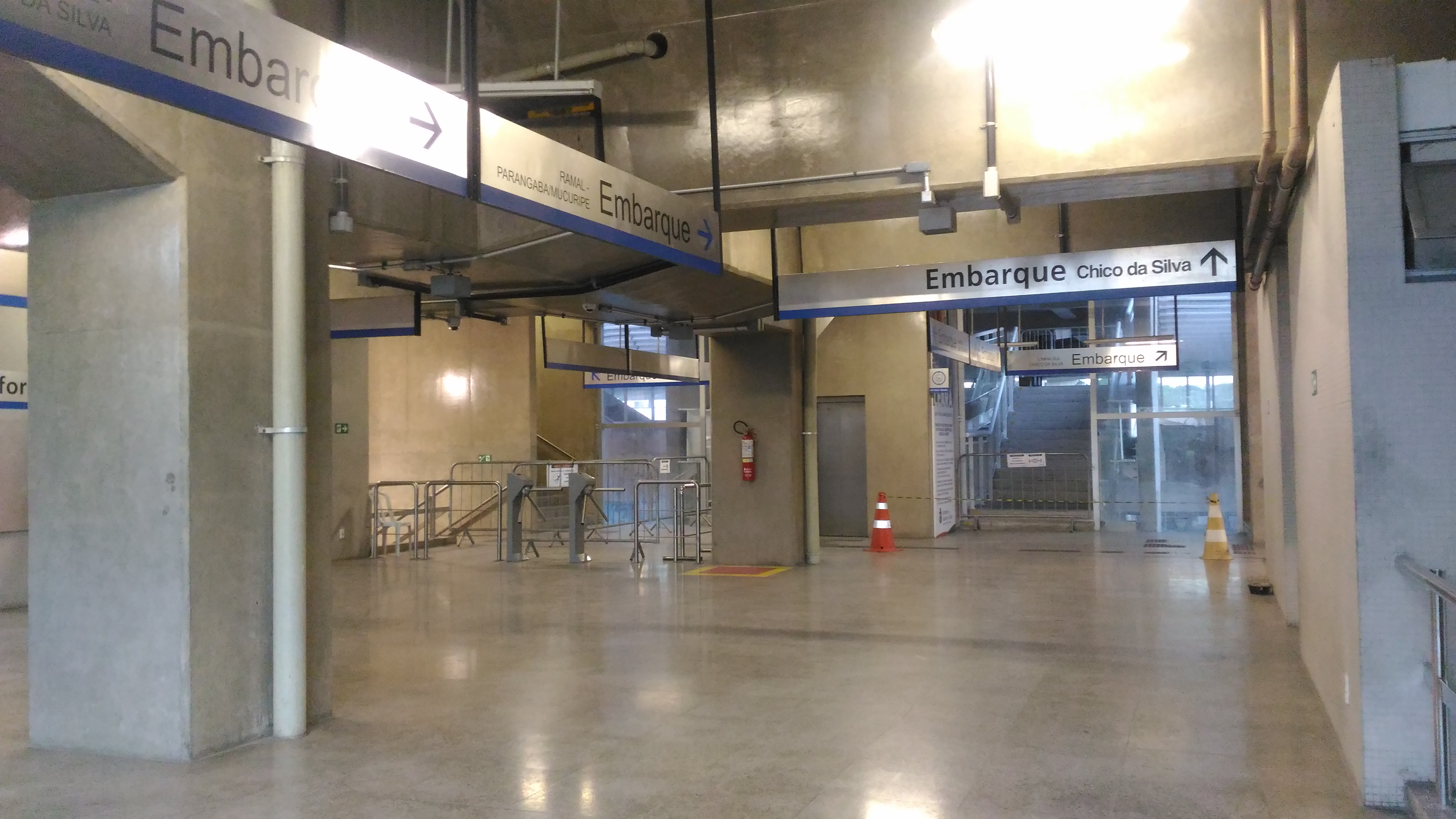 Ligação entre as plataformas da linha Sul do metrô na estação Parangaba com a plataforma do VLT da linha Parangaba-Mucuripe.